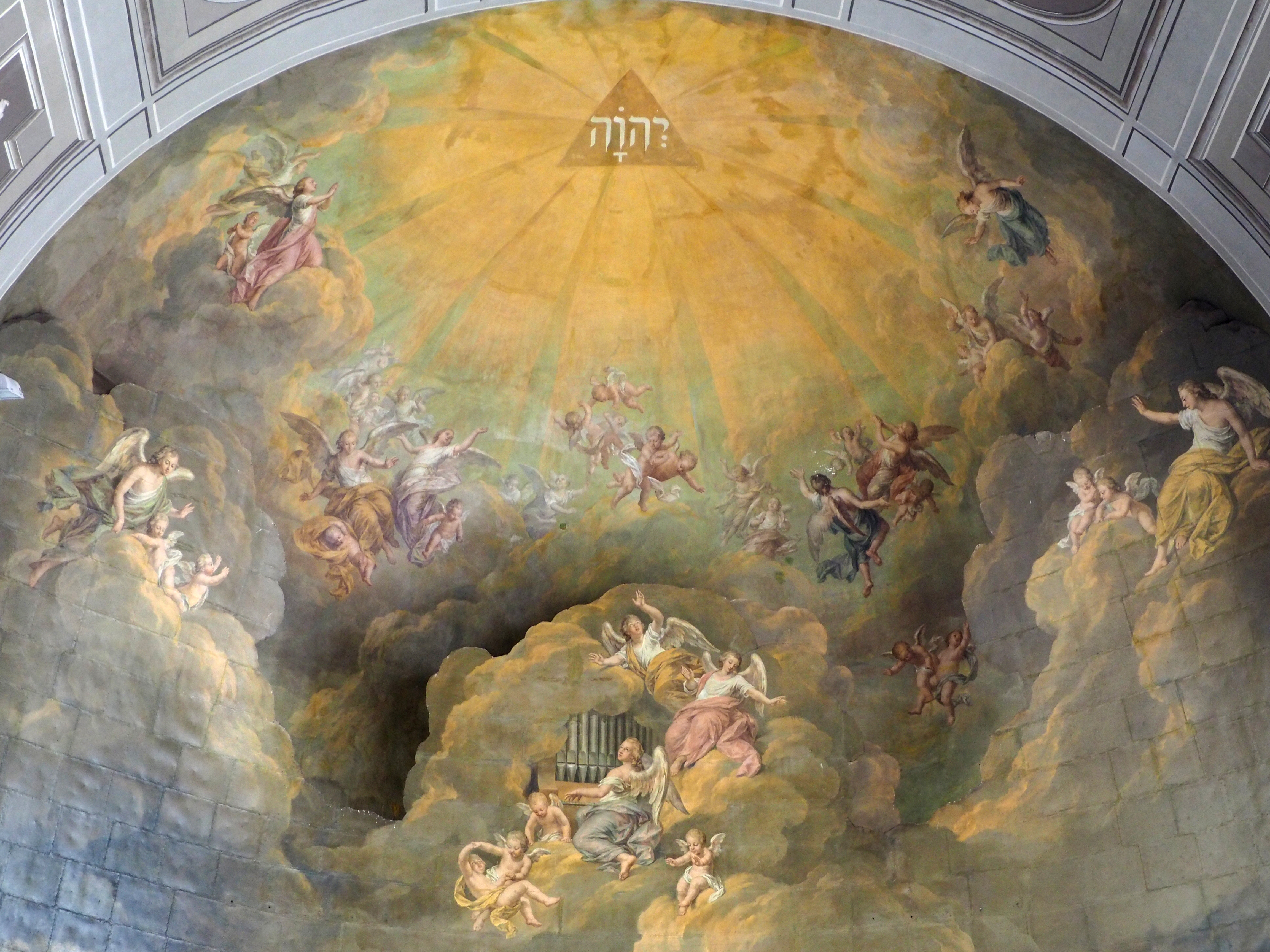 Innenraum der Stadtkirche, Detail aus dem Altargemälde mit den Orgelpfeifen